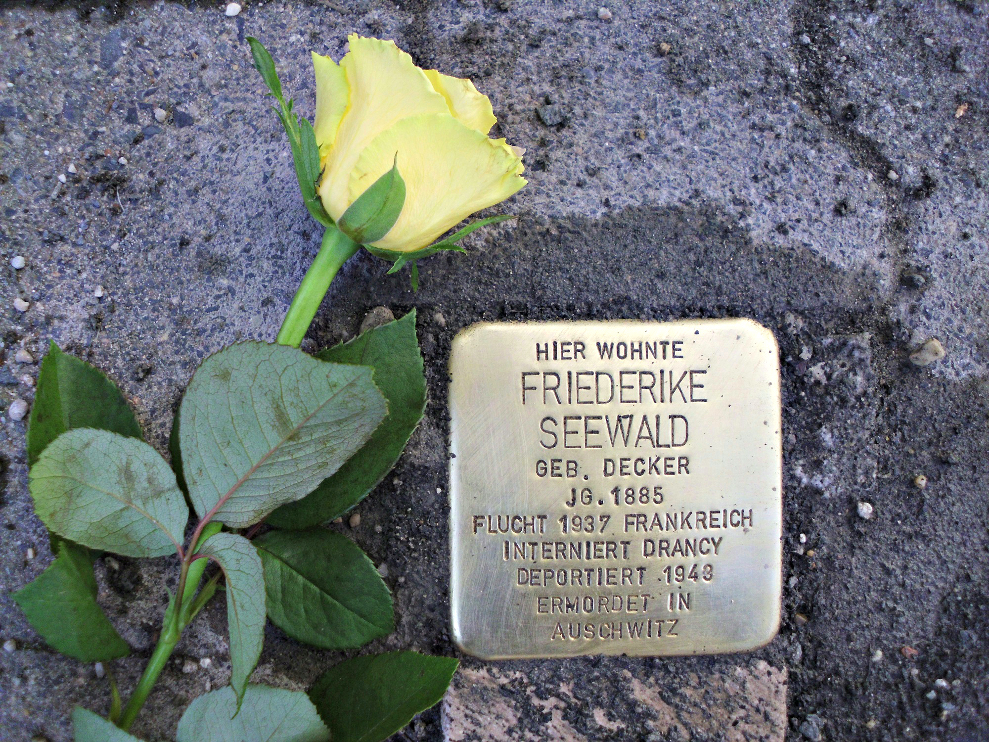 Stolperstein Friederike Seewald (August-Storch-Straße 8 Butzbach)